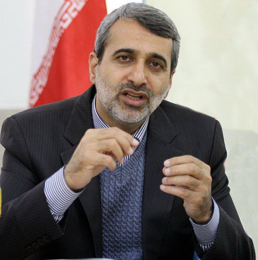 دکتر عباس مقتدایی